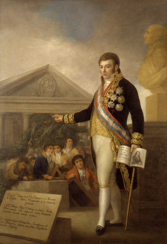 La obra representa al político español Manuel Godoy (1767-1851), que fue valido del rey Carlos IV de España, como fundador del Real Instituto Militar Pestalozziano, que fue creado en 1805 por deseo de Manuel Gogoy y disuelto en 1808, apenas tres años después de su creación.